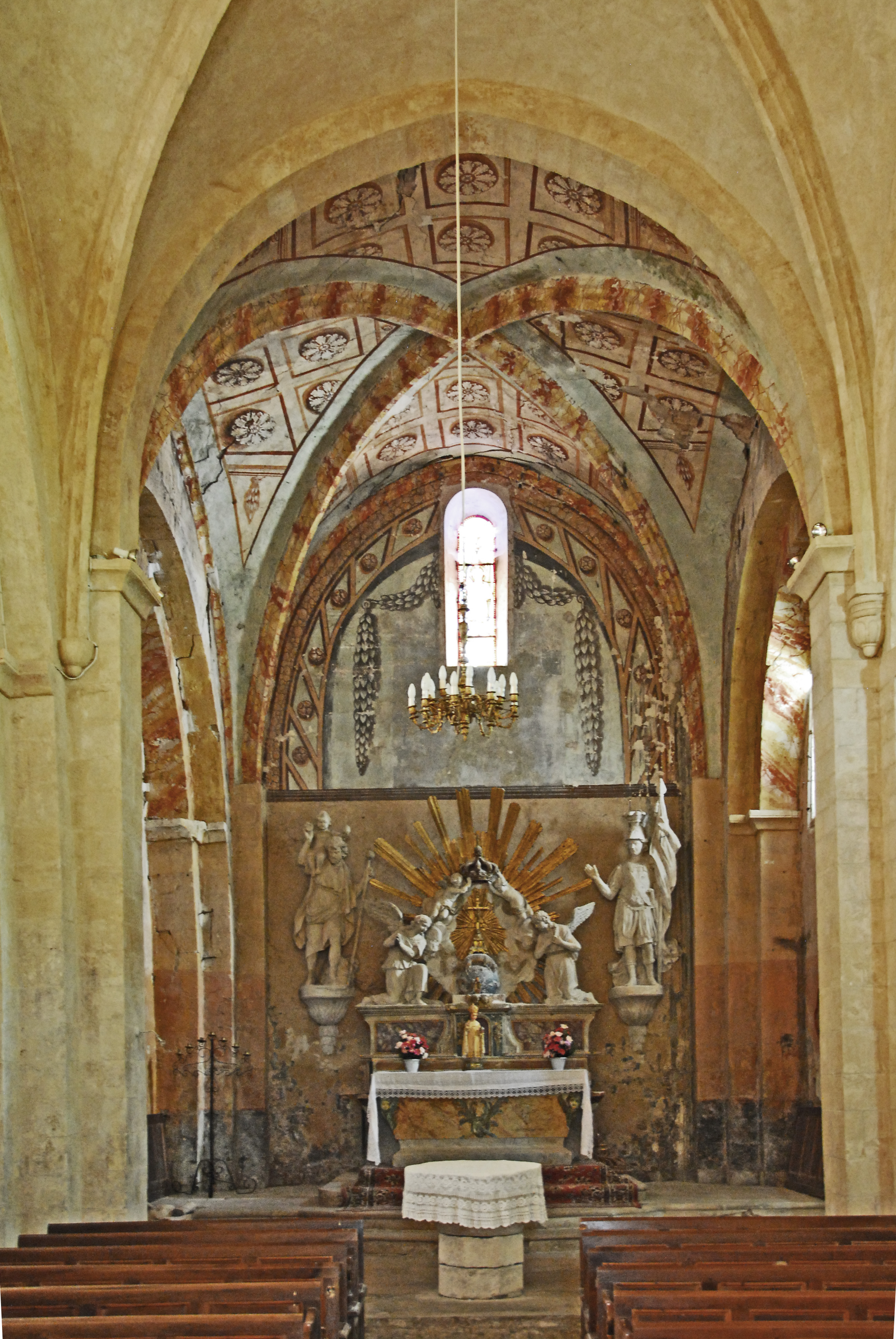 N-D et St-Christophe de St-Christol, Hauptschiff nach Westen